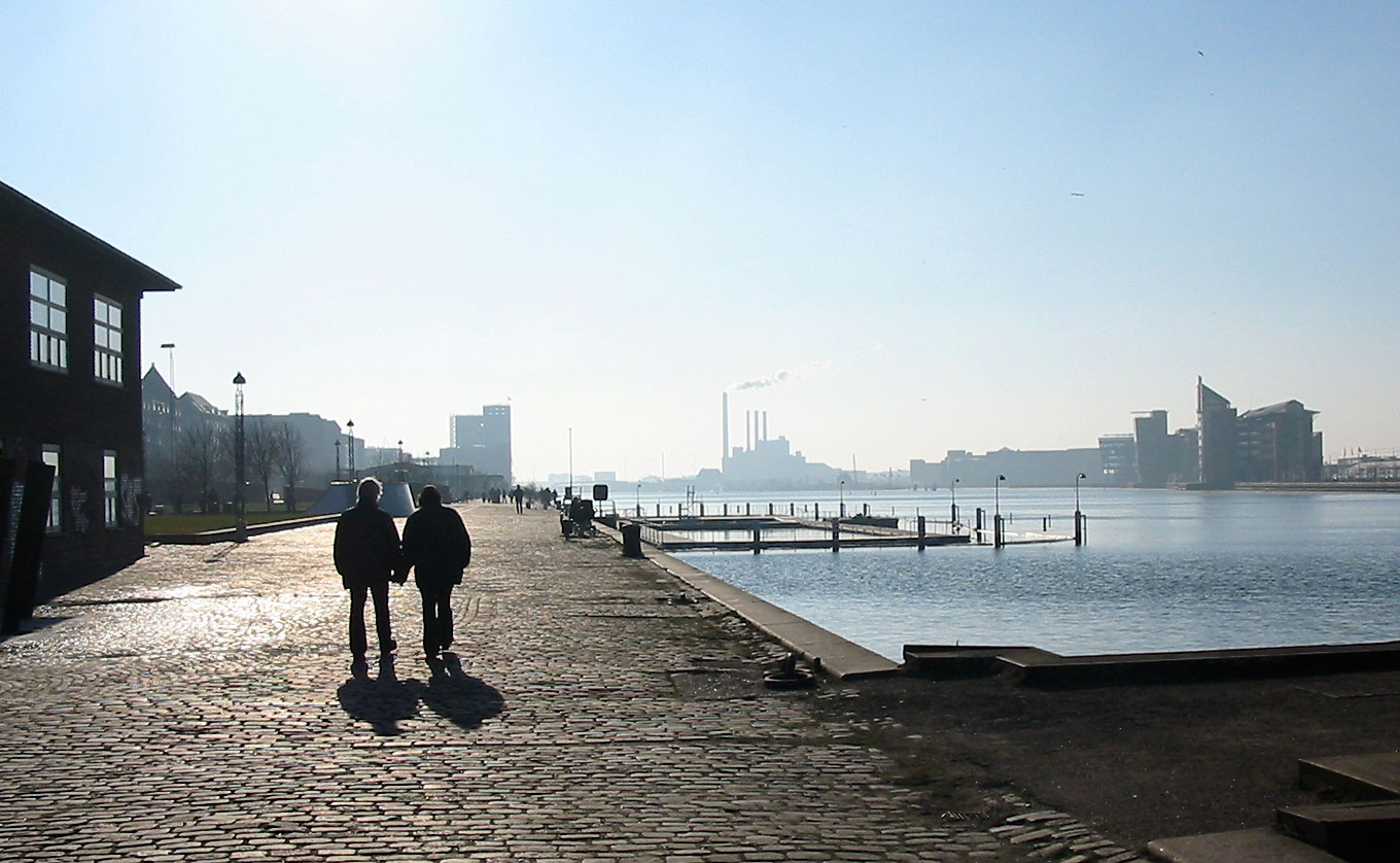 Sydhavnen. I baggrunden ses en del af det tidligere tunge industrikvarter, der er ved at blive erstattet af kontorvirksomheder. "I modlys" : Fotograferet fra Islands Brygge mod Kalvebod Brygge, Havneholmen og Fisketorvet. I midten ses H.C. Ørstedværket.Sydhavnen er en bydel i København, Danmark og befinder sig langt bagude i venstre side af billedet.